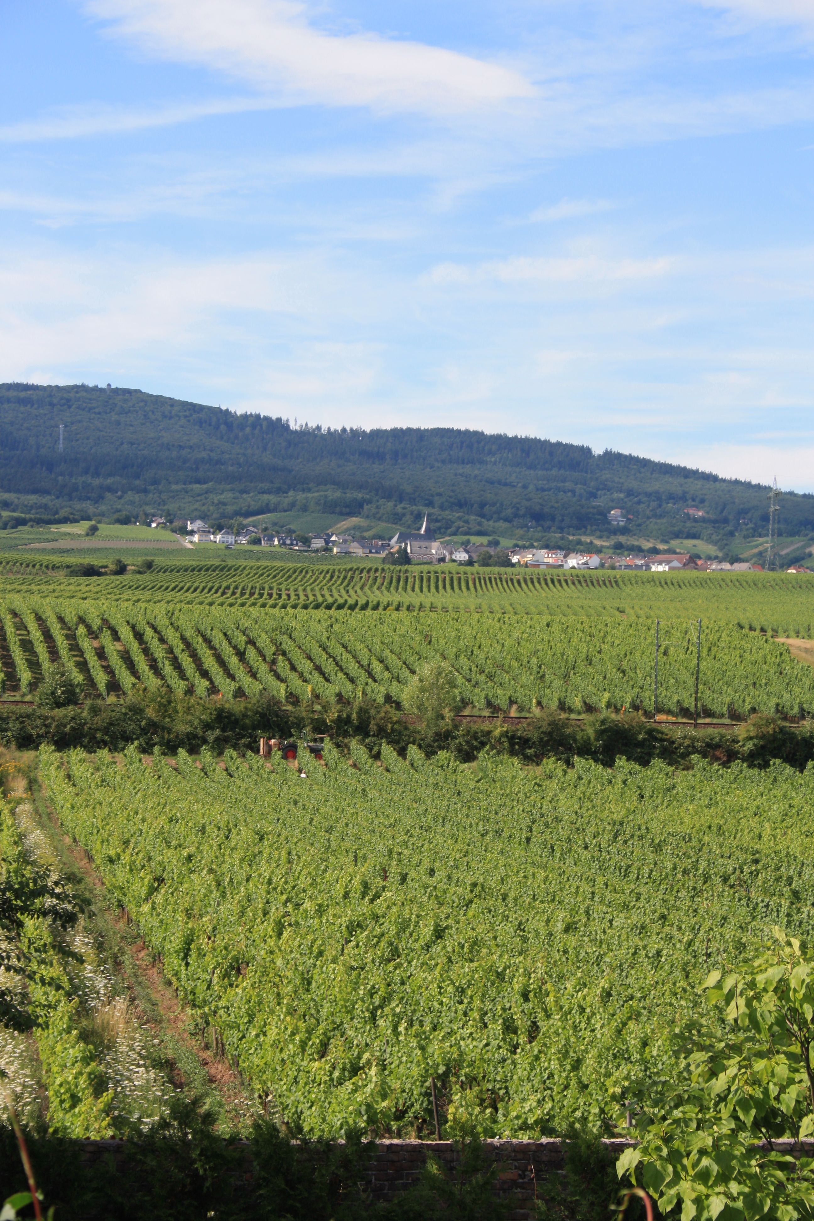 Weingut H. T. Eser - Christoph & Thomas Eser